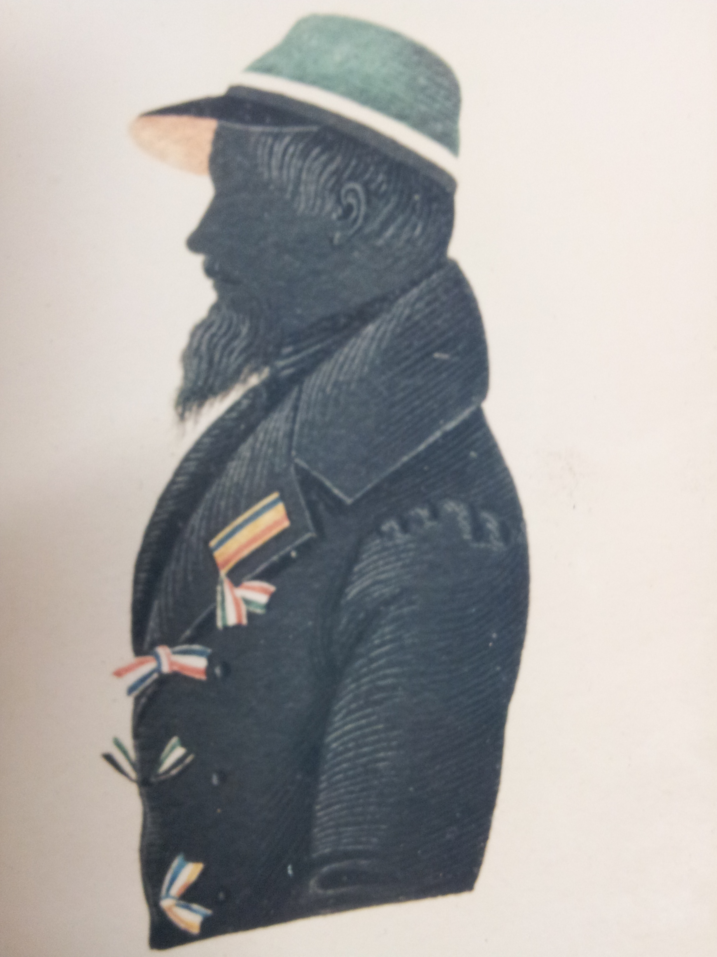 Ferdinand Ludwig von Schutzbar - gen. von Milching